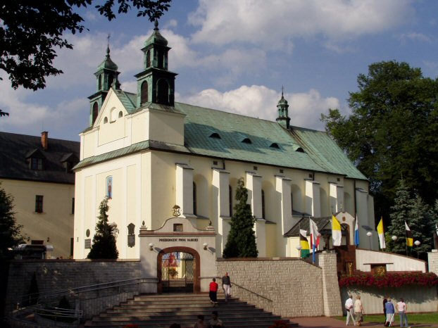 Sanktuarium Matki Boskiej Leśniowskiej w Żarkach - Leśniowie